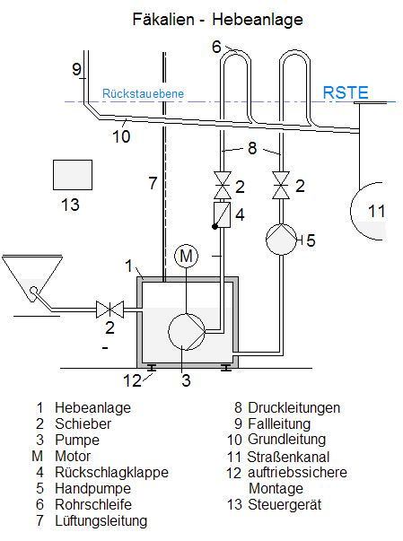 Fäkalienhebeanlage